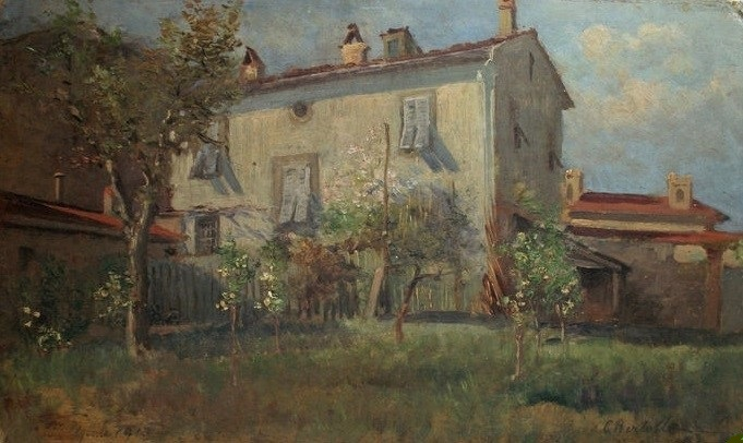 "Villa a San Concordio", olio cartone, 22,6 x 38,3 cm., firmato